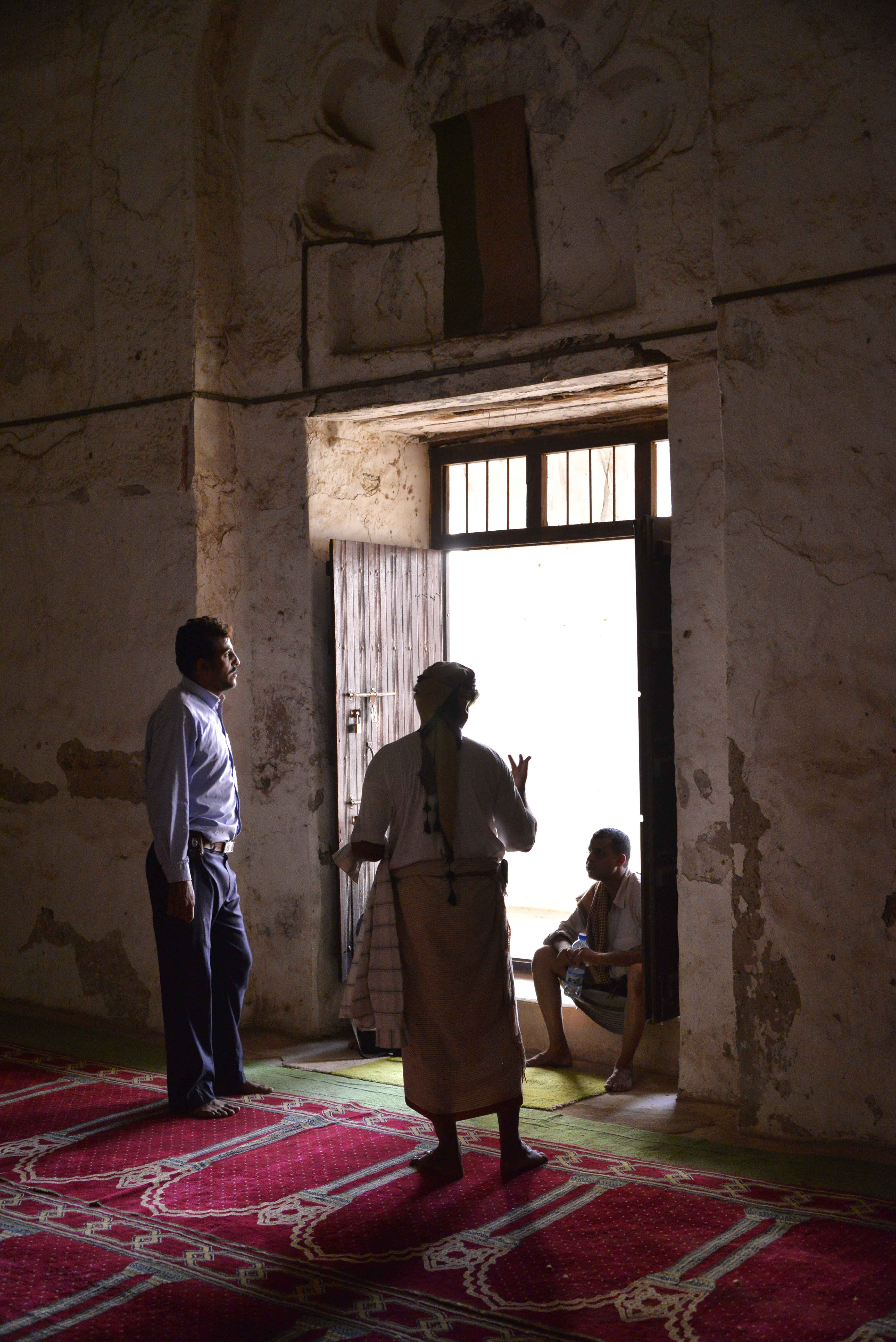 Discussion, Yemen